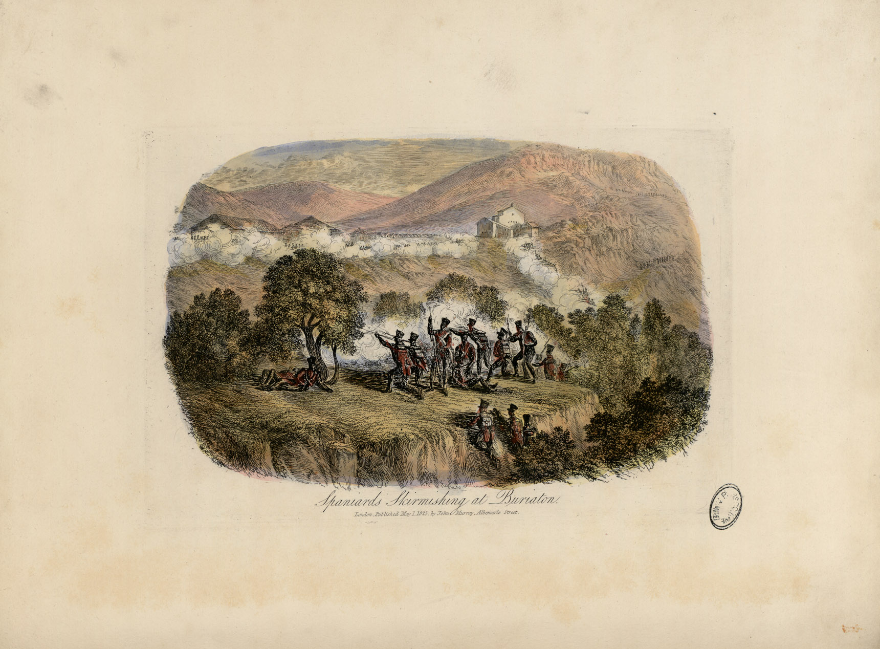 25 gravures sur cuivre aquarellées, 1 carte dessinée et gravée par B. R. Baker, imprimée par Rowney et Forster, lettre par J. Netherclift. - Toutes portent la mention : London, published May 1823, by John Murray, Albemarle Street. Il existe une traduction française, dactylographiée, réalisée par Renée Fourcade et déposée au Musée Basque de Bayonne. Il existe une traduction française, dactylographiée, réalisée par Renée Fourcade et déposée au Musée Basque de Bayonne. Double en couleurs du A-BATTY (1) Ancely, René (1876 - 1966). Possesseur